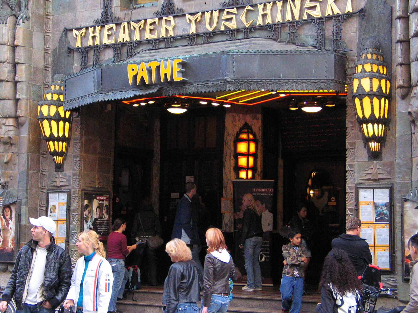 Very art deco cinema in Amsterdam.